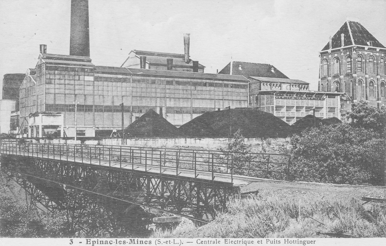 La centrale thermique situé à côté du puits Hottinguer.